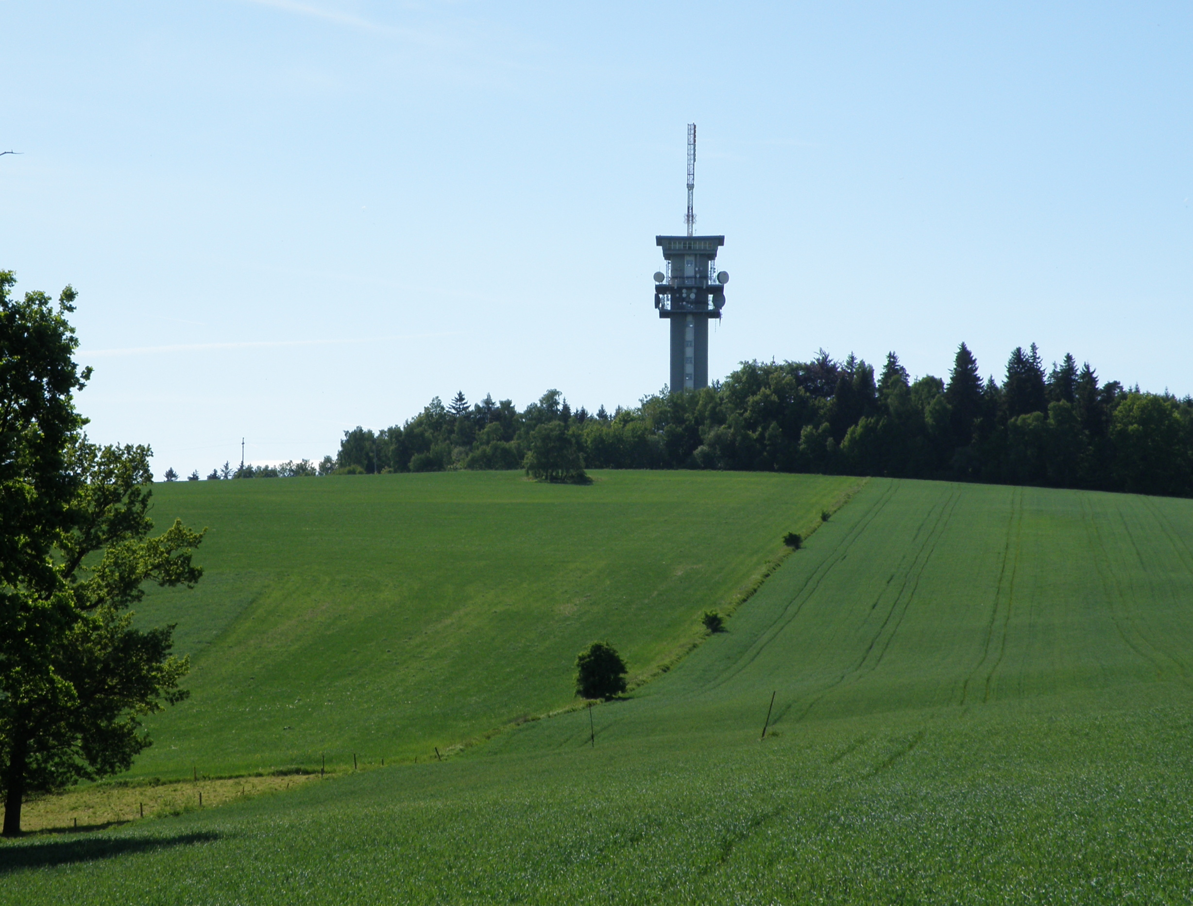 Vrchol Zelené hory (637 m. n. m.) s televizním vysílačem.